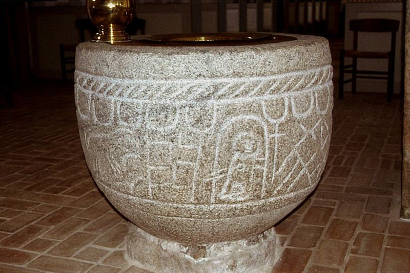 Lerup Kirke i Danmark. Lerup kirke (Øster Han hr.), døbefont